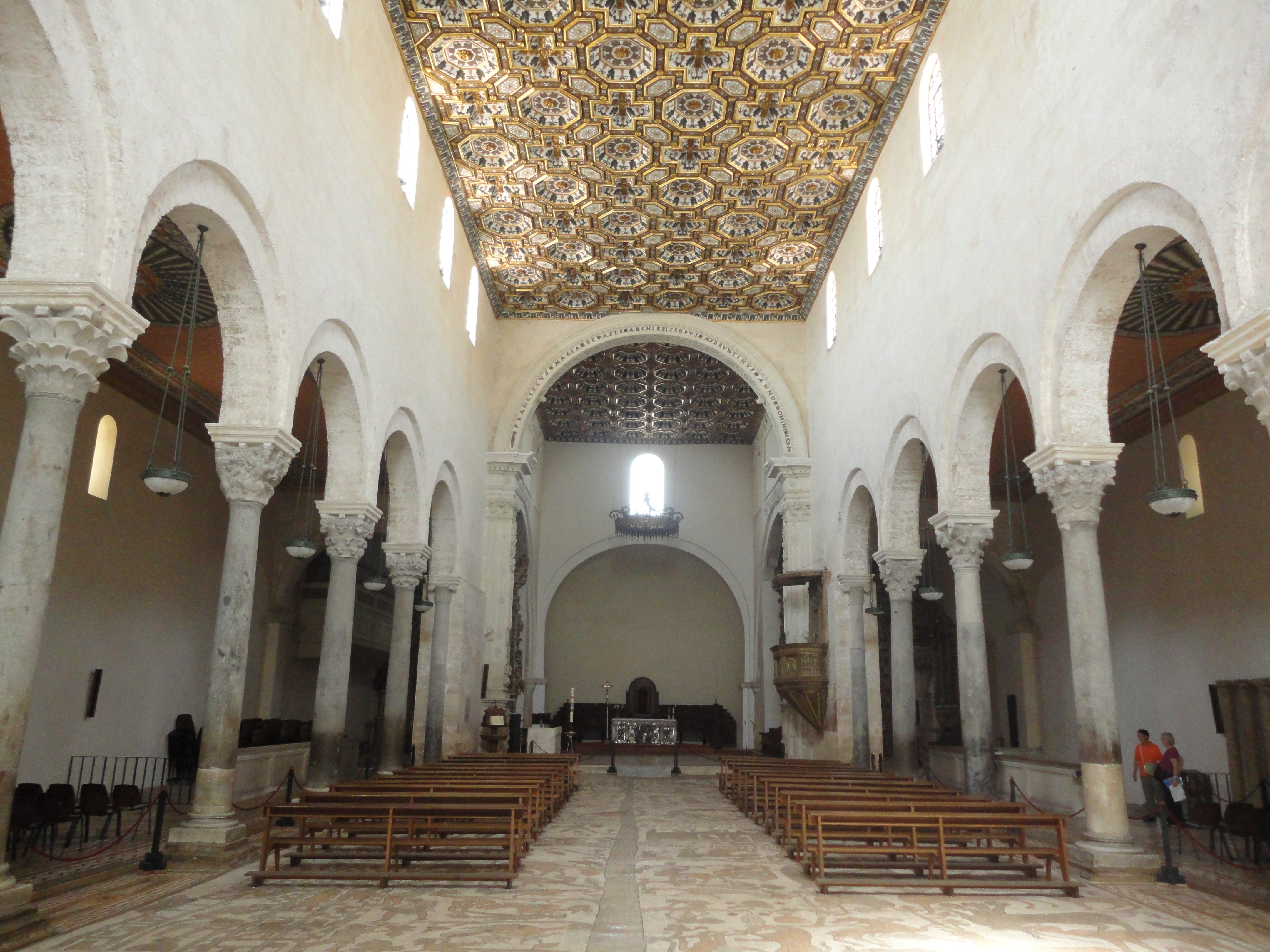 Interno cattedrale di Otranto